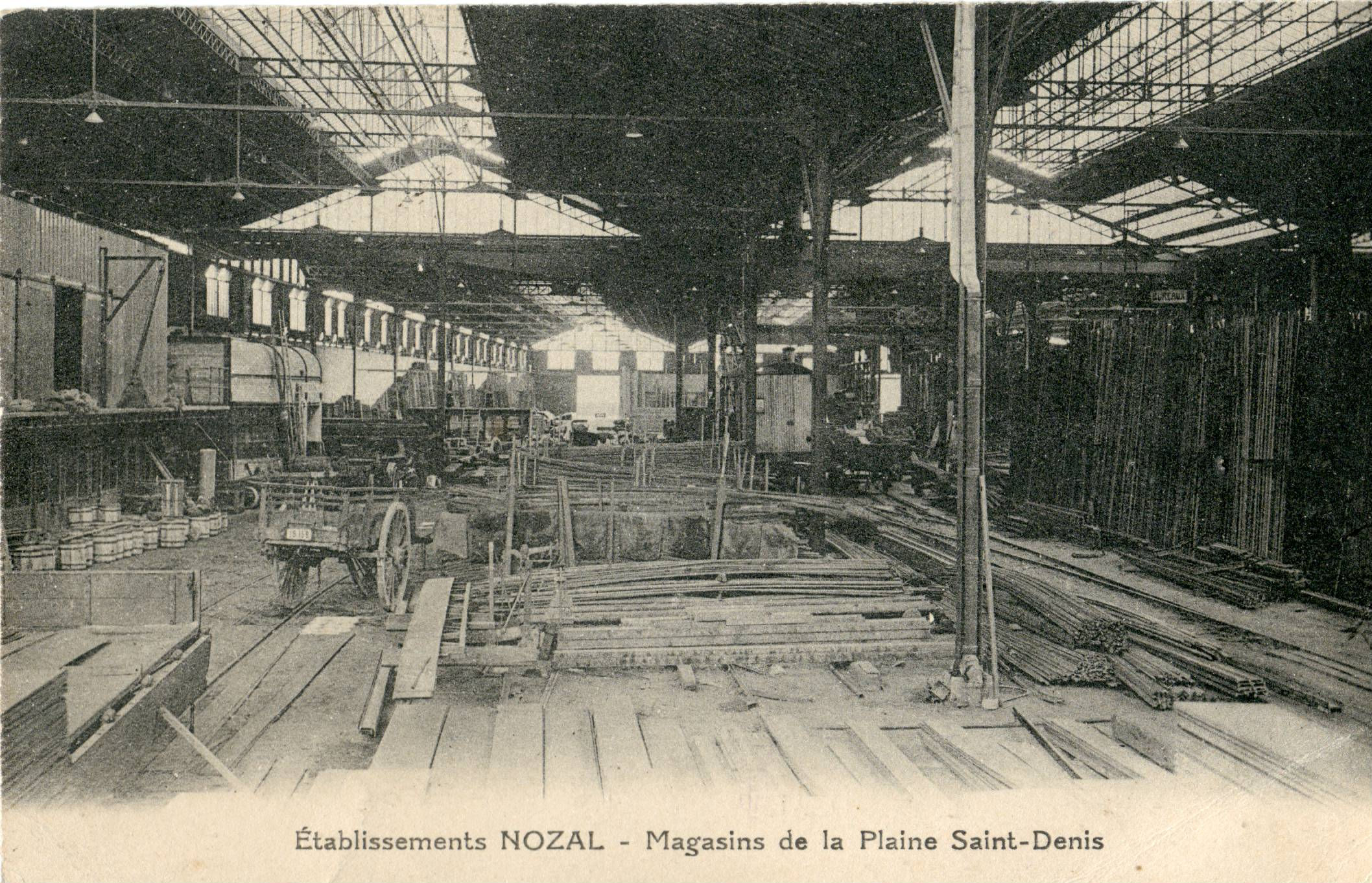 Carte publicitaire de l'entreprise NOZALEtablissements NOZAL : Magasins de la LA PLAINE SAINT-DENIS (Commune de Saint-Denis (93))